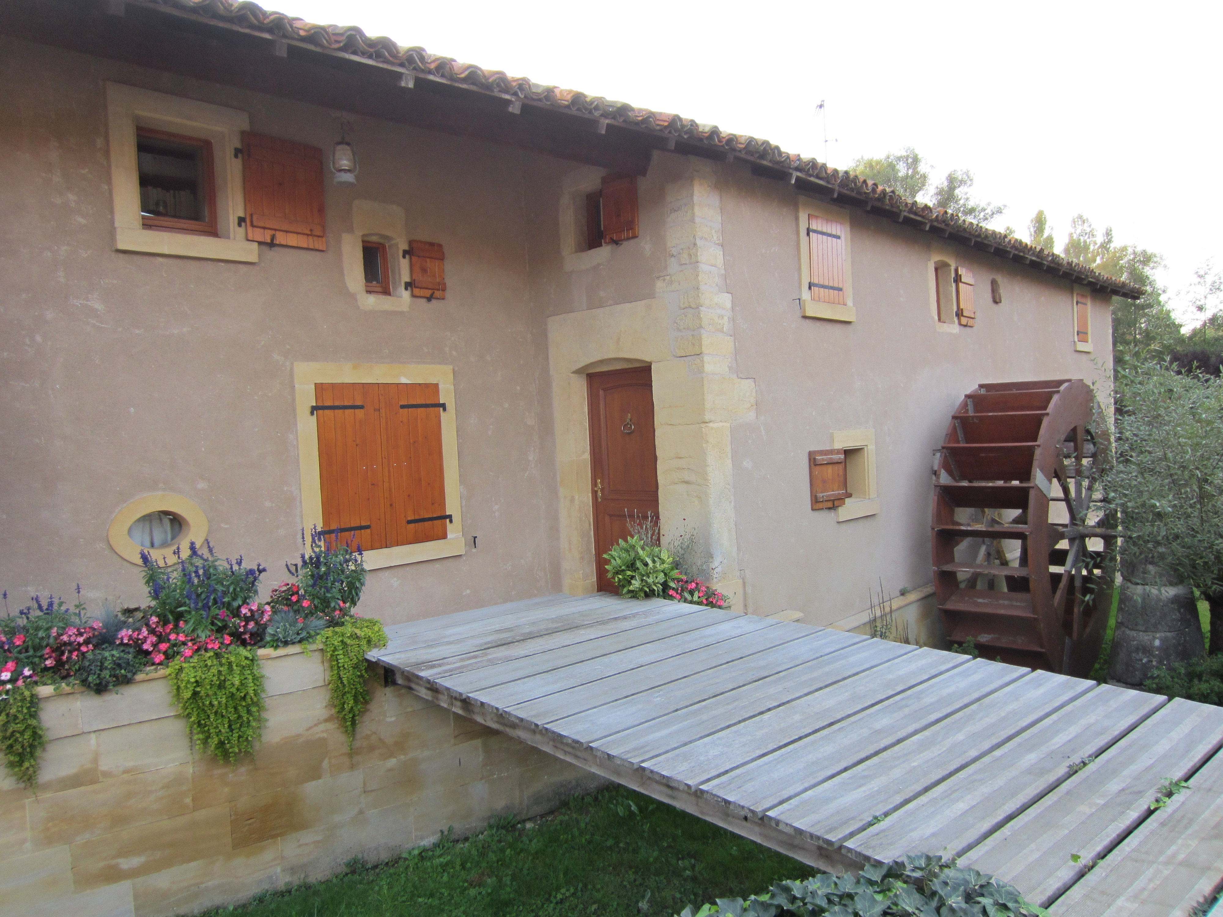 Description ancien moulin Ville Yron ancien moulin Ville Yron